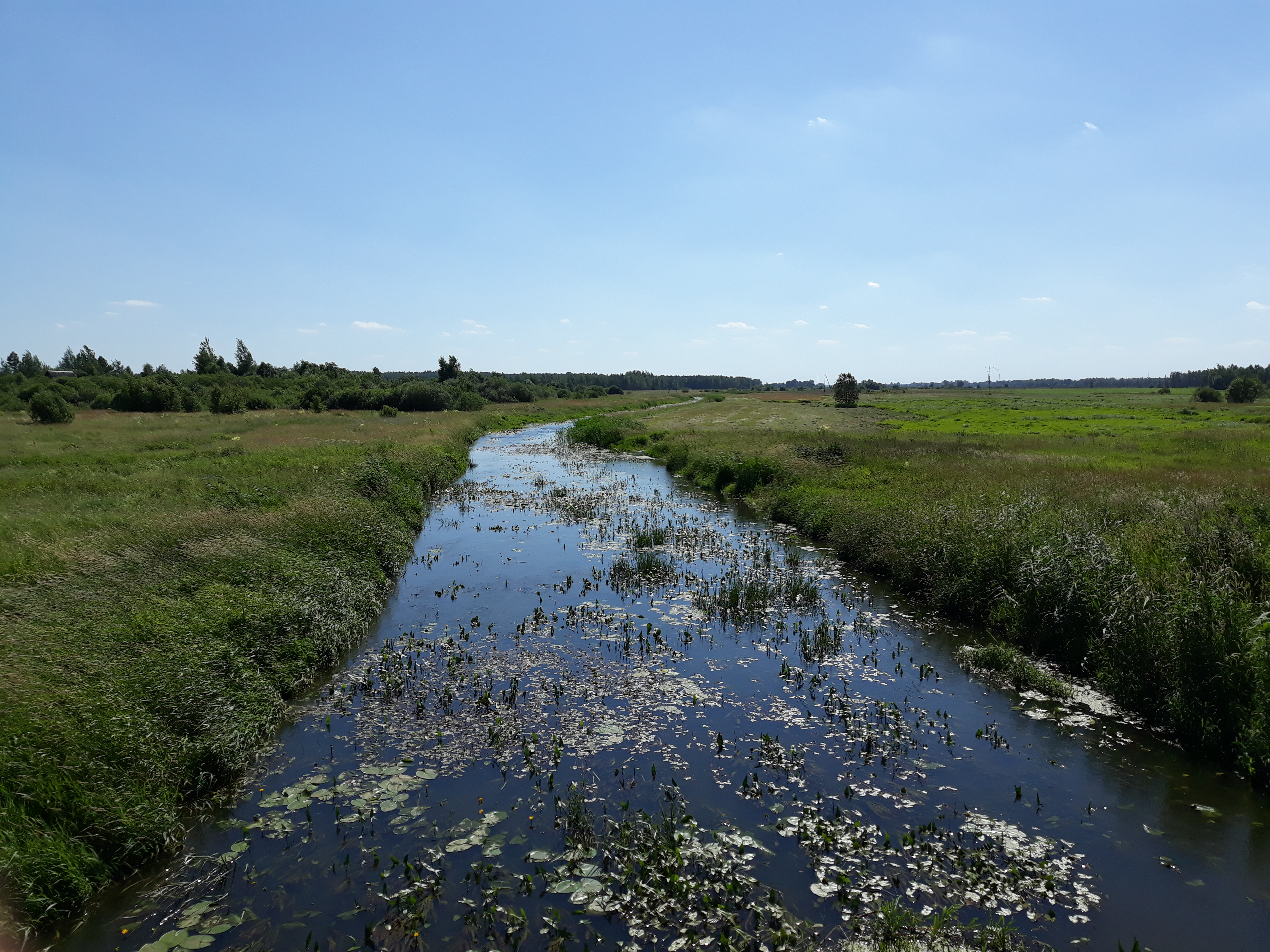 рака Сведзь ля вёскі Селішчы Светлагорскага раёну